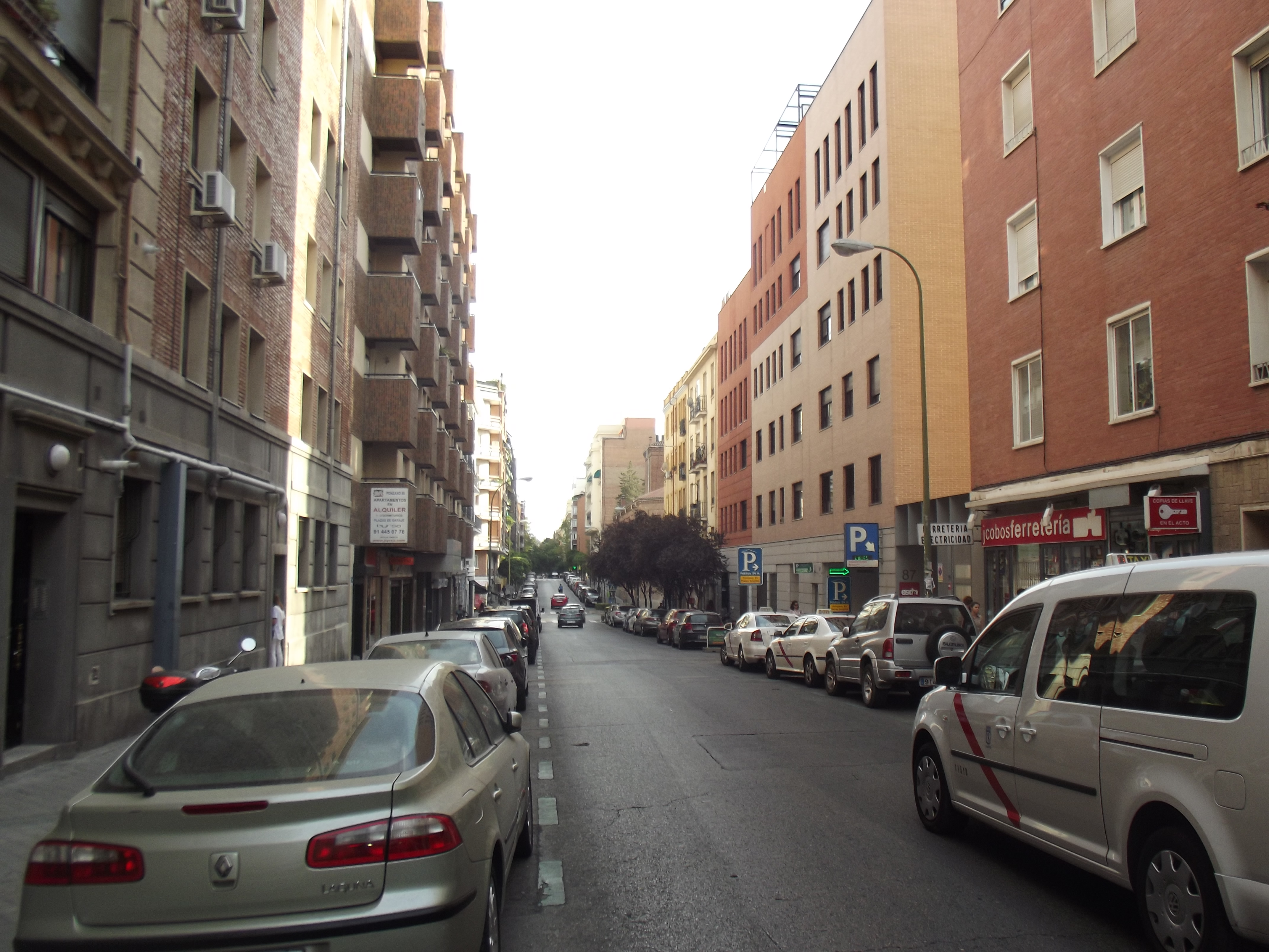 Calle de Ponzano, Madrid.